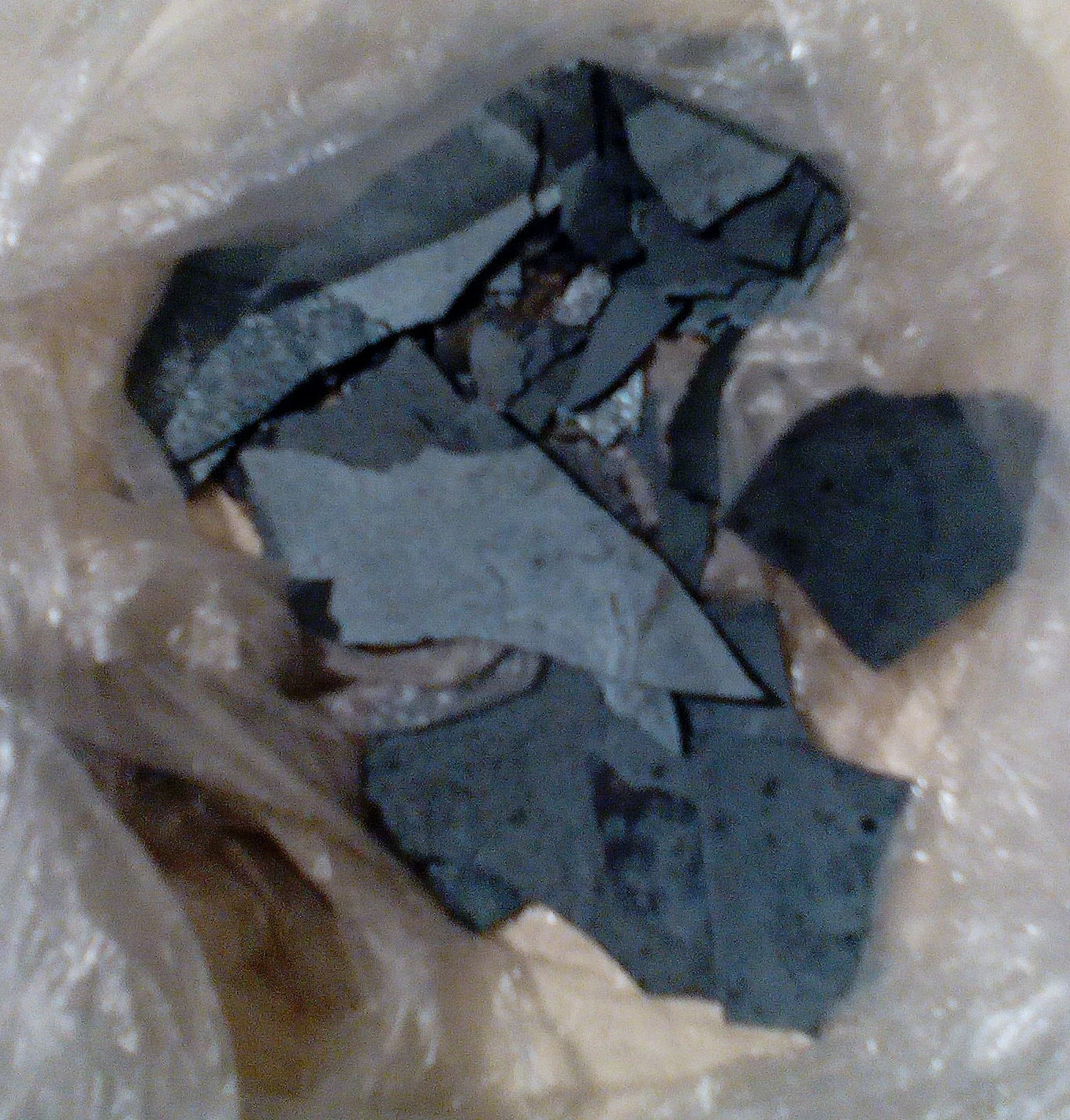 Тверді осади, що випали на земельні ділянки мешканців Василькова Київської області під час Пожежа на нафтобазі.